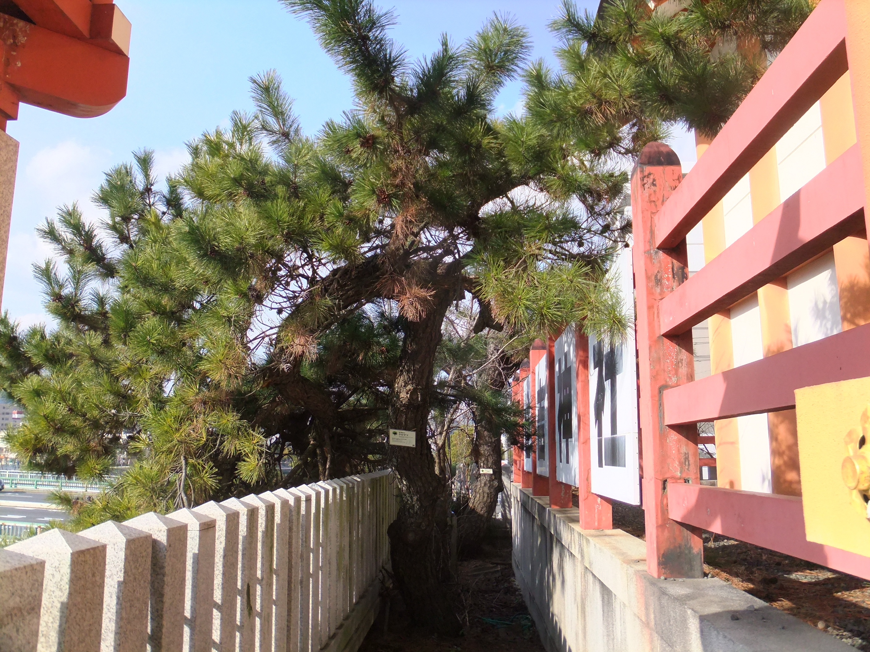 広島の住吉神社